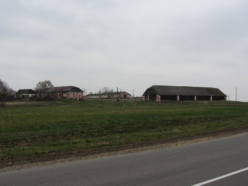 Цапра. Сядзіба. Гаспадарчая пабудова